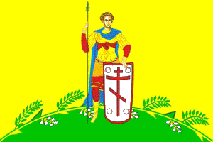 Флаг Дмитриевского сельского поселения, Краснодарский край, Россия.